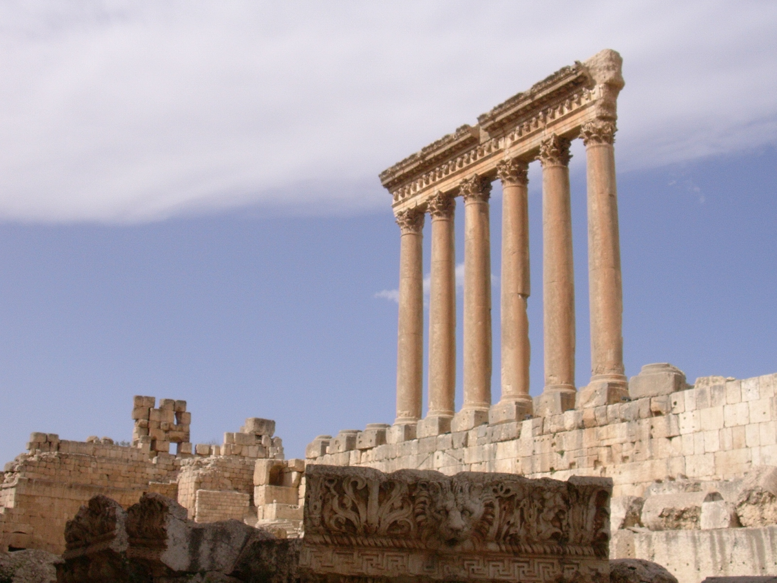 Baalbek